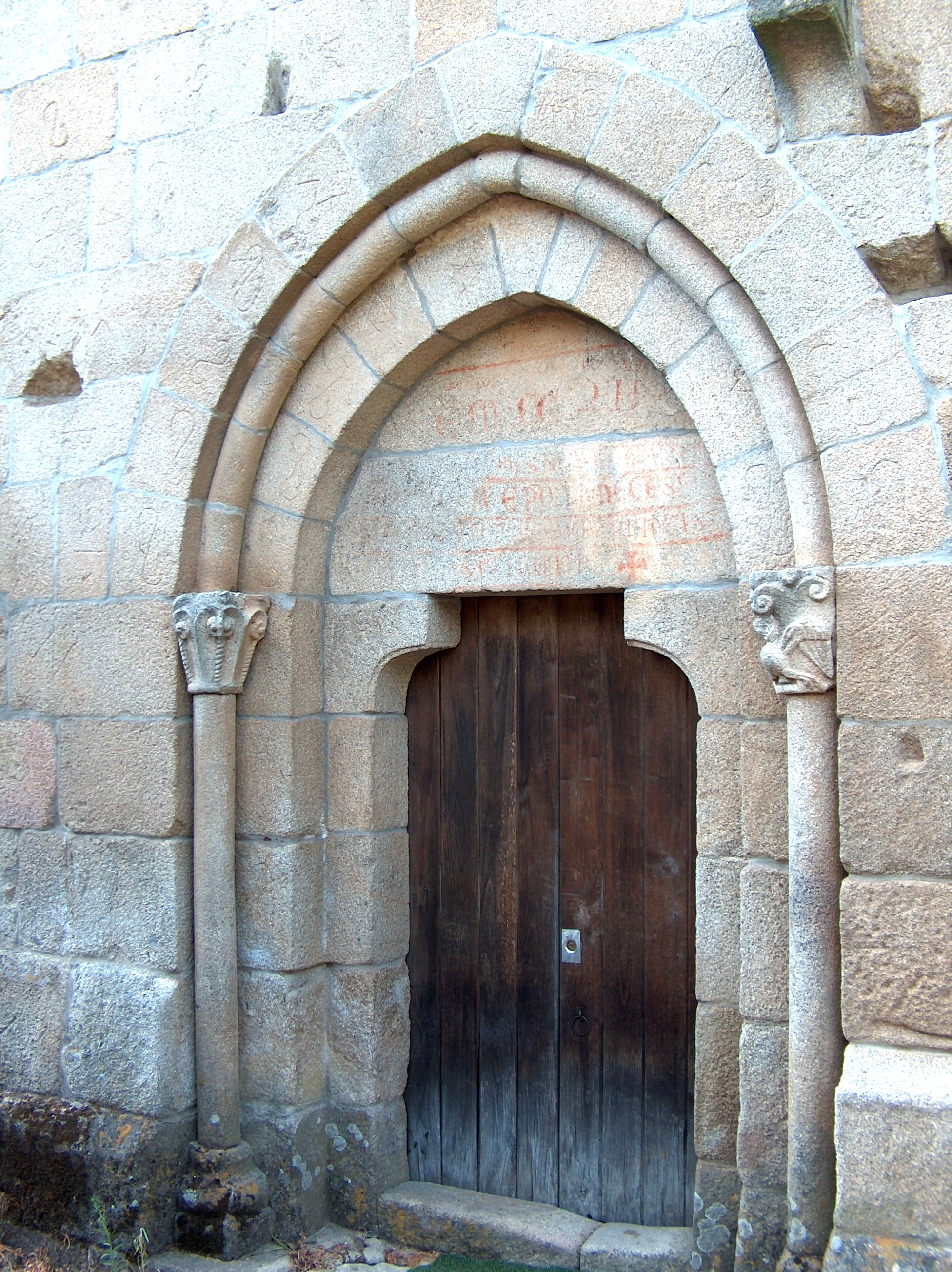 Igreja de Nossa Senhora da Conceição (Ermida). Ermida de Paiva, Castro Daire, Portugal.